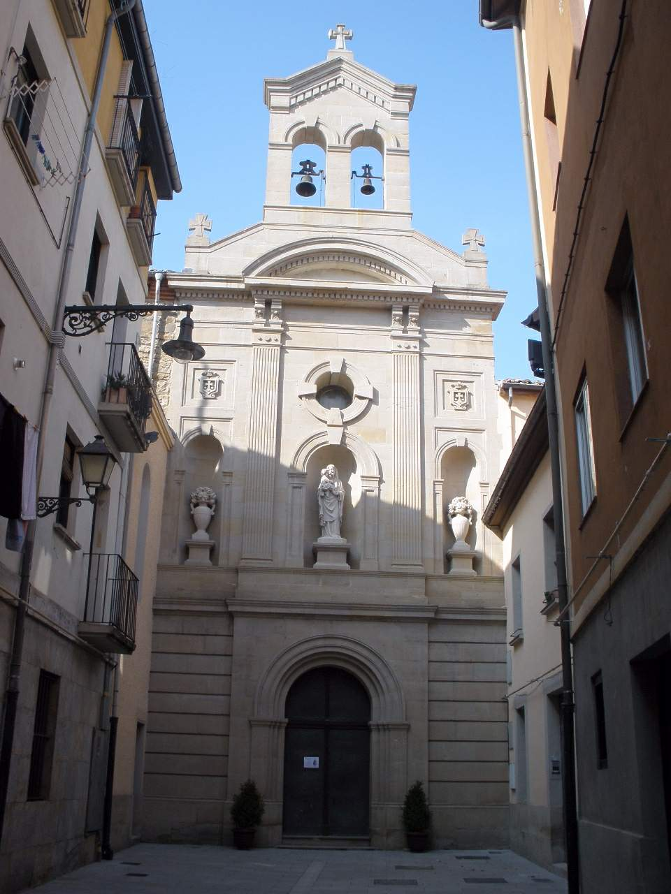 Convento de las Carmelitas Descalzas (Pamplona)